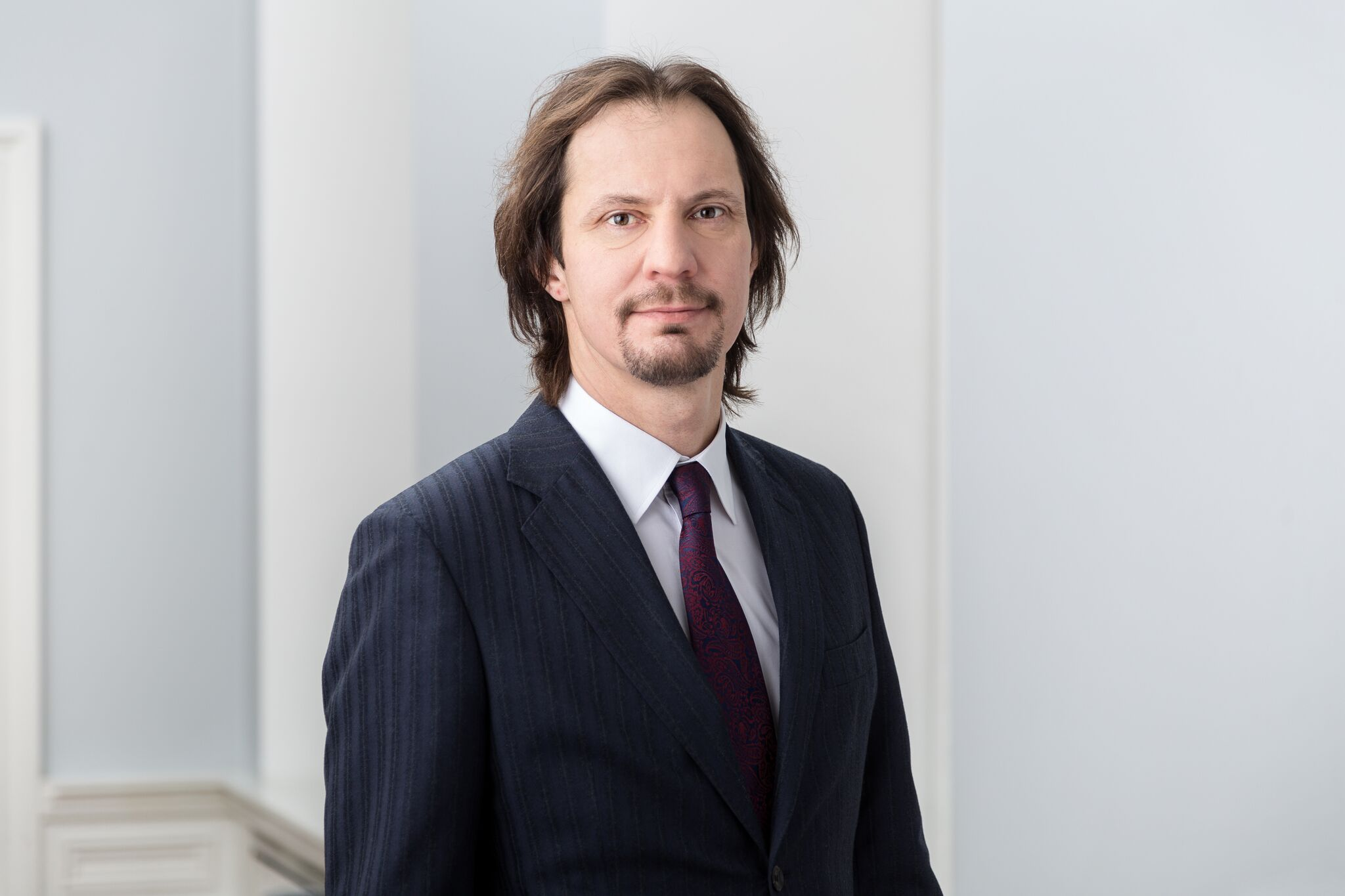 Indrek Saar